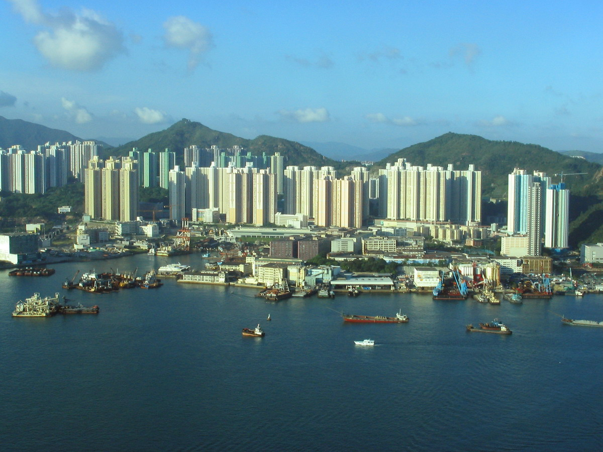 油塘 Yau Tong